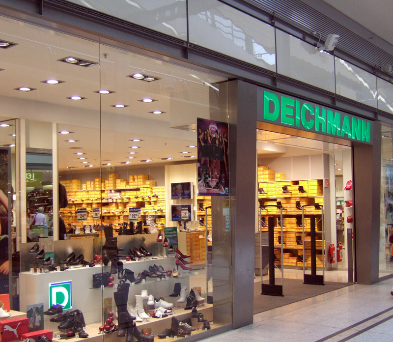 Deichmann Geschäft in Potsdam